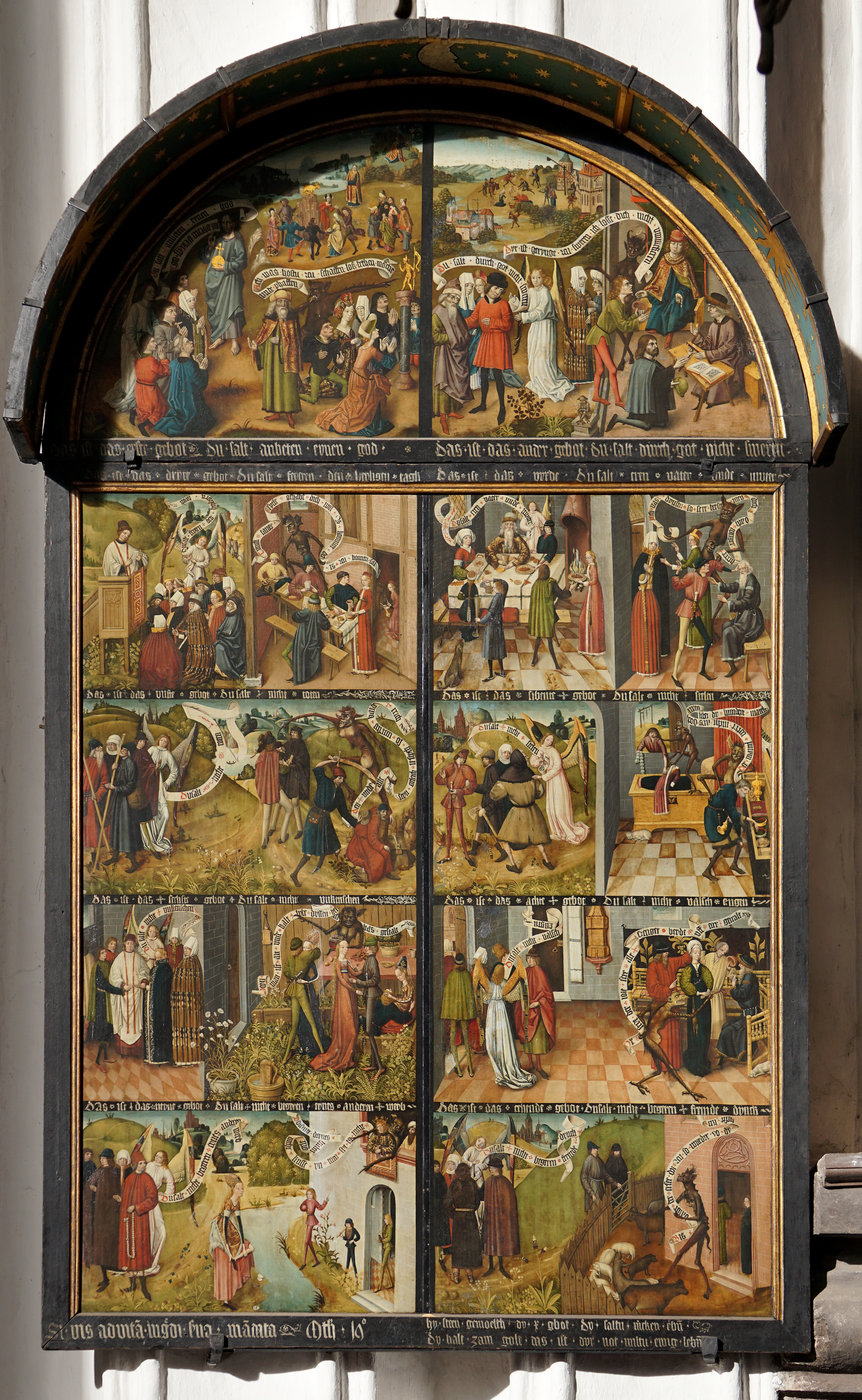 Tablica Dziesięciorga przykazań, lata 80. XV w.